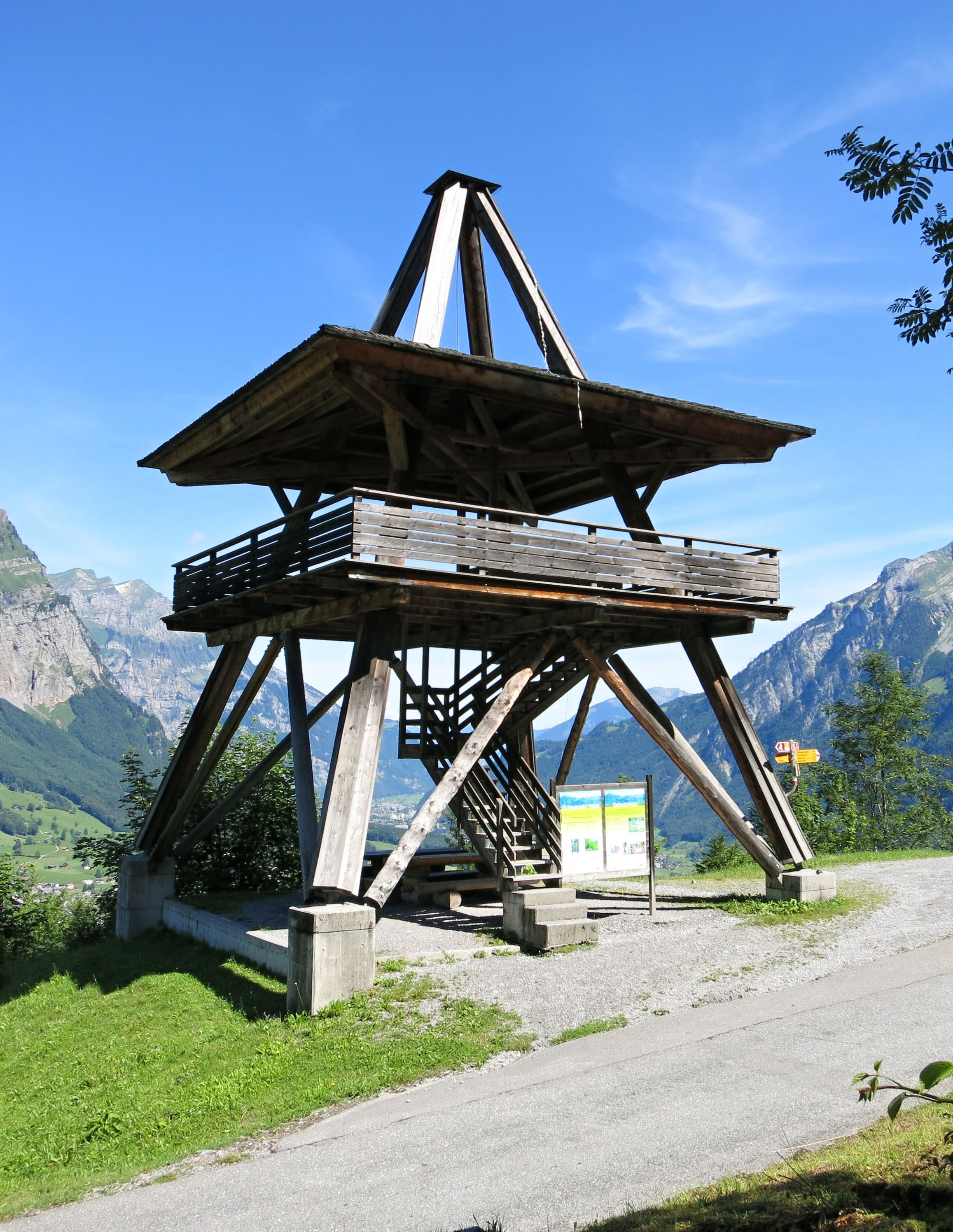 Schwander Turm